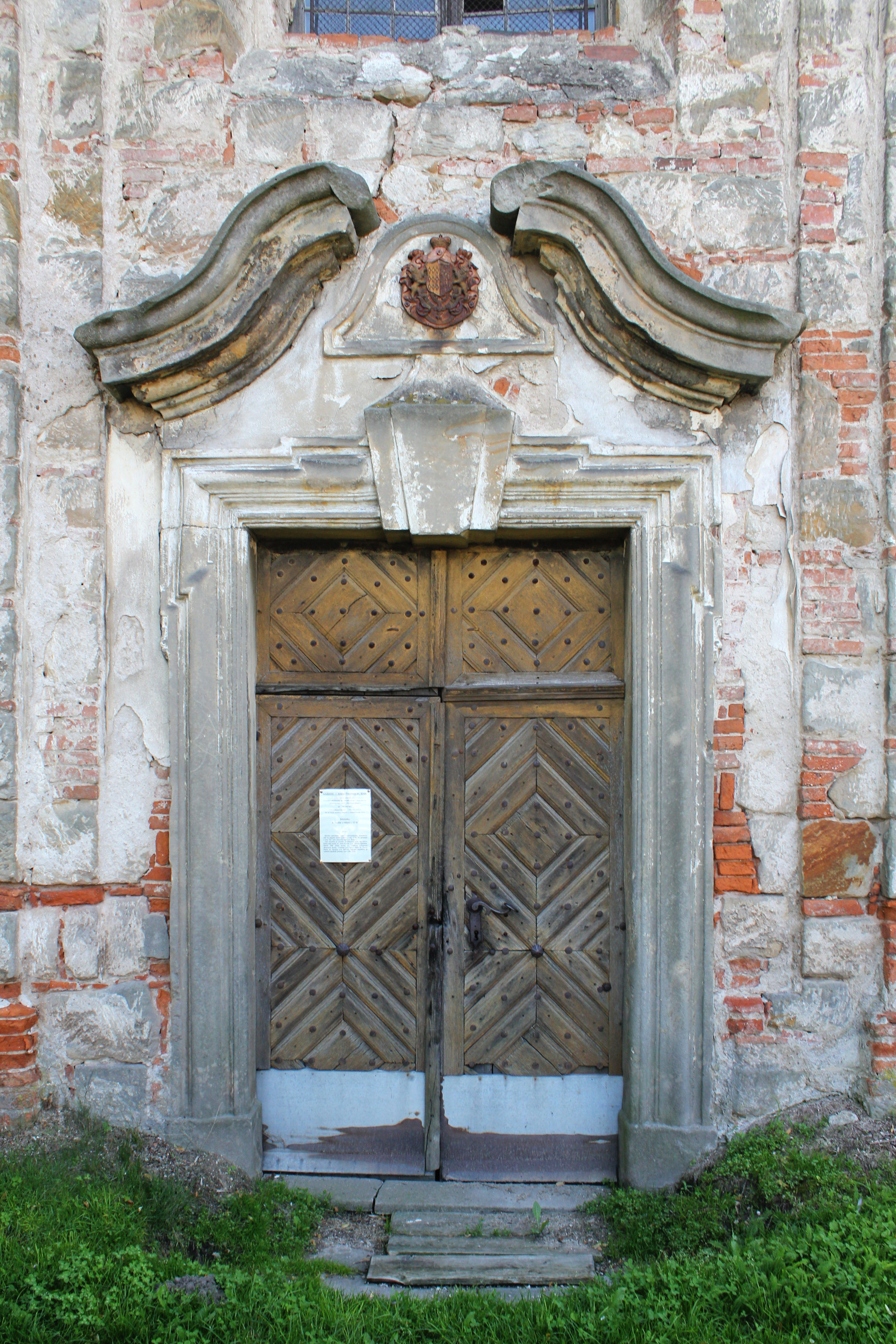 Kostel Povýšení Svatého Kříže - detail dveří, Loukovec